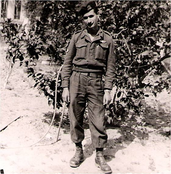 אורי לבוביץ ( 31 בינואר 1946 - 6 ביוני 1967) היה חייל צה"ל שעוטר בעיטור המופת על לחימתו בגבעת התחמושת במלחמת ששת הימים. לבוביץ היה חובש קרבי שעוטר על דבקות במשימה. במשך כל הלחימה, טיפל בפצועים, גם באלה שנפגעו, ושכבו במקומות חשופים והיו תחת ירי של הליגיון הירדני. לבוביץ נהרג בעת שטיפל בשני חיילים פצעים. הוא נקבר בבית הקברות הצבאי בהר הרצל. בתמונה אורי לבוביץ במדי חייל